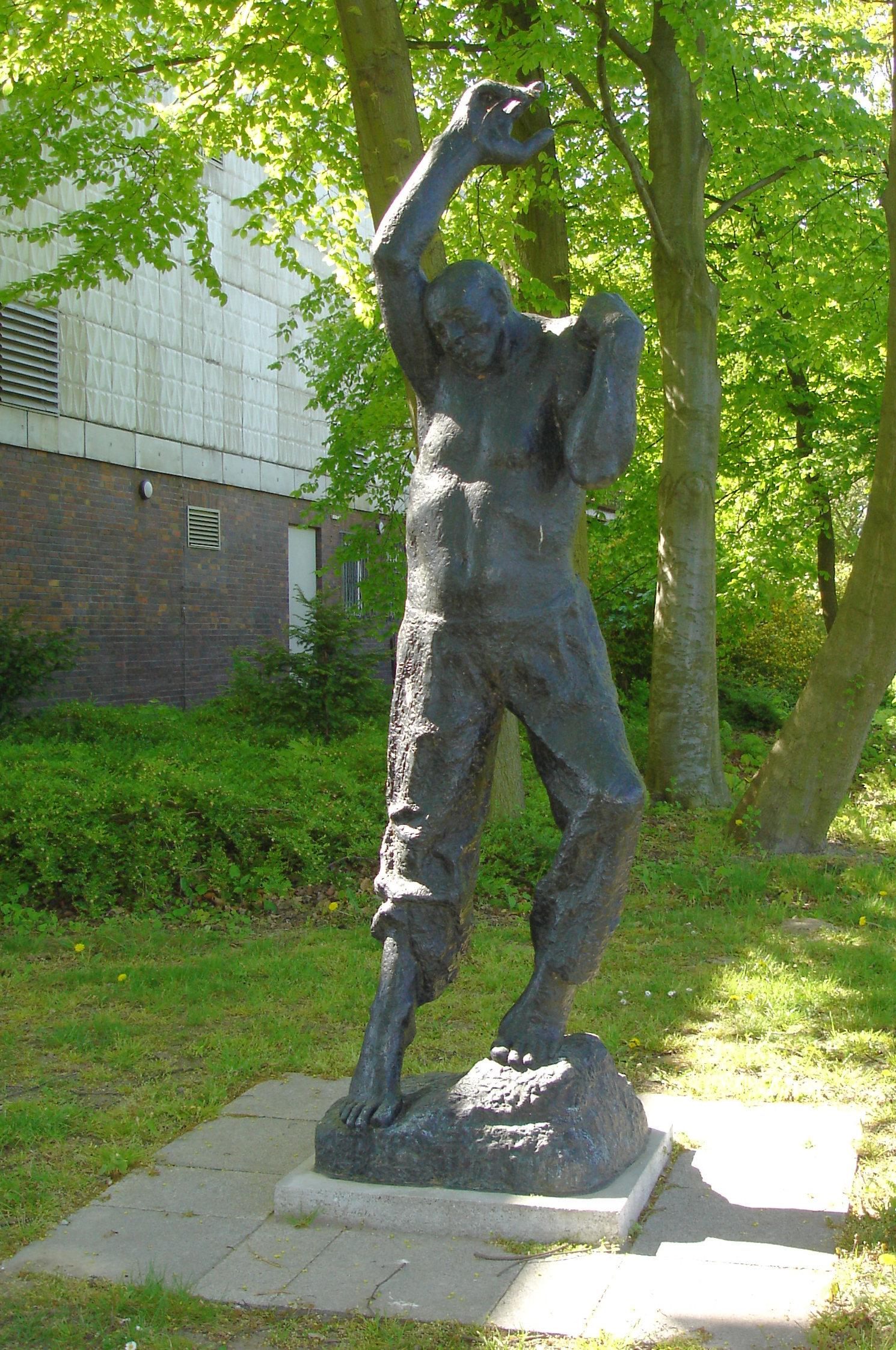 Bronzestatue ‘Aufsteigender’ (1966/67) von Fritz Cremer vor der Kunsthalle in Rostock / Statue ‘Aufsteigender’ (1966/67) by Fritz Cremer in front of the "Kunsthalle" in Rostock